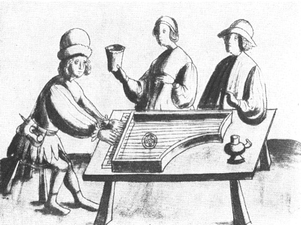 Clavecin primitif - Weimarer Wunderbuch - ca. 1440